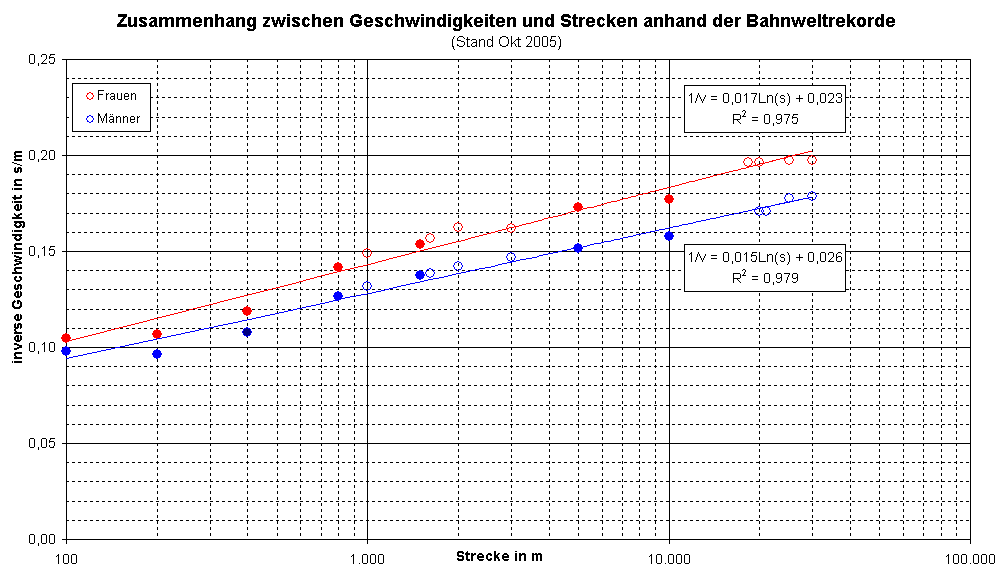 Inverse Geschwindigkeit über ln(Strecke/Meter) der Bahnweltrekorde (Laufen), olympische Disziplinen sind gefüllt markiert